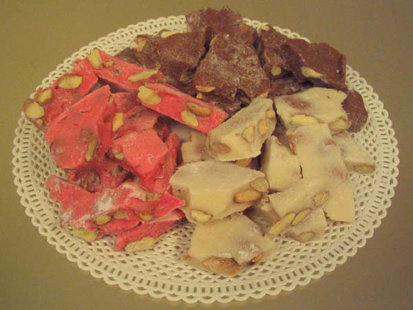 Noga